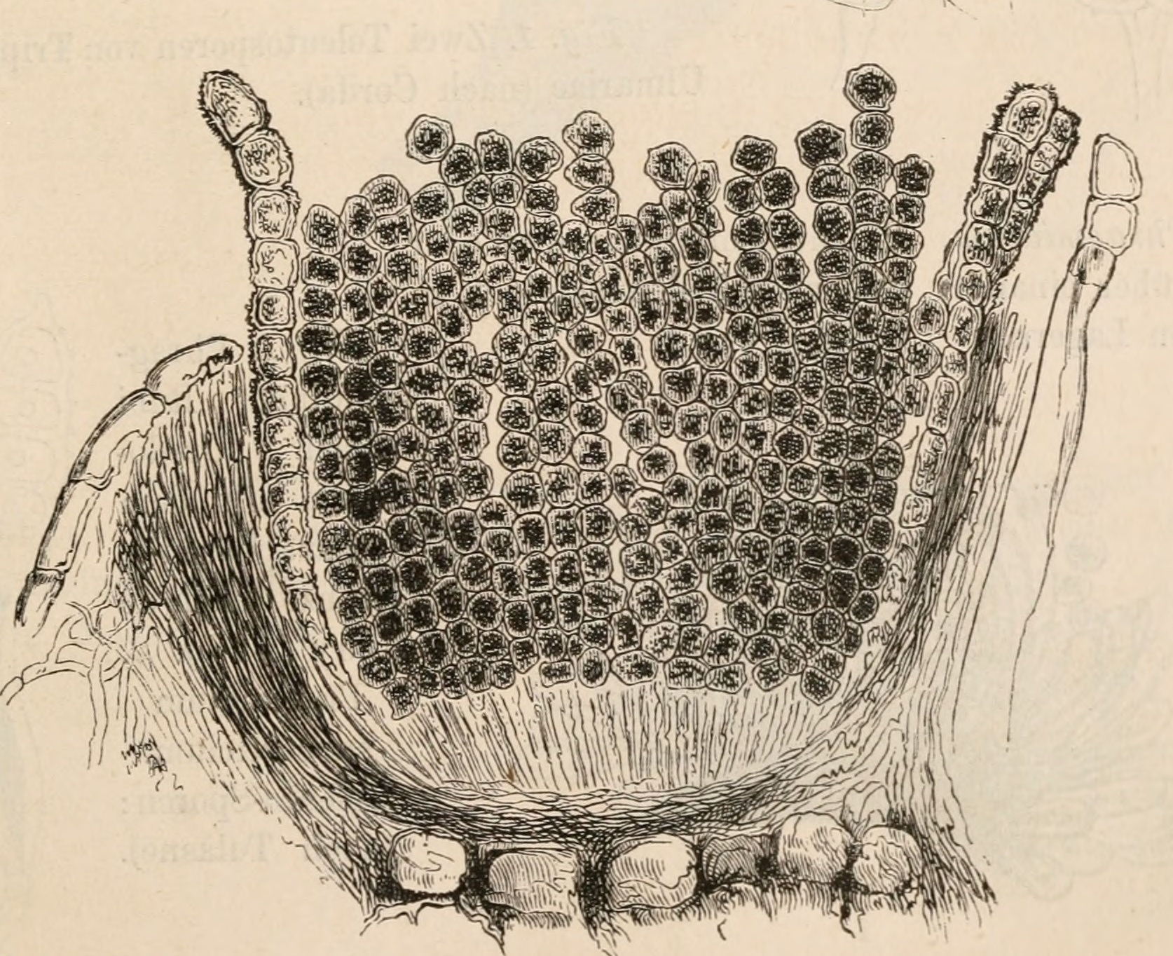 Aecium Puccinia caricina